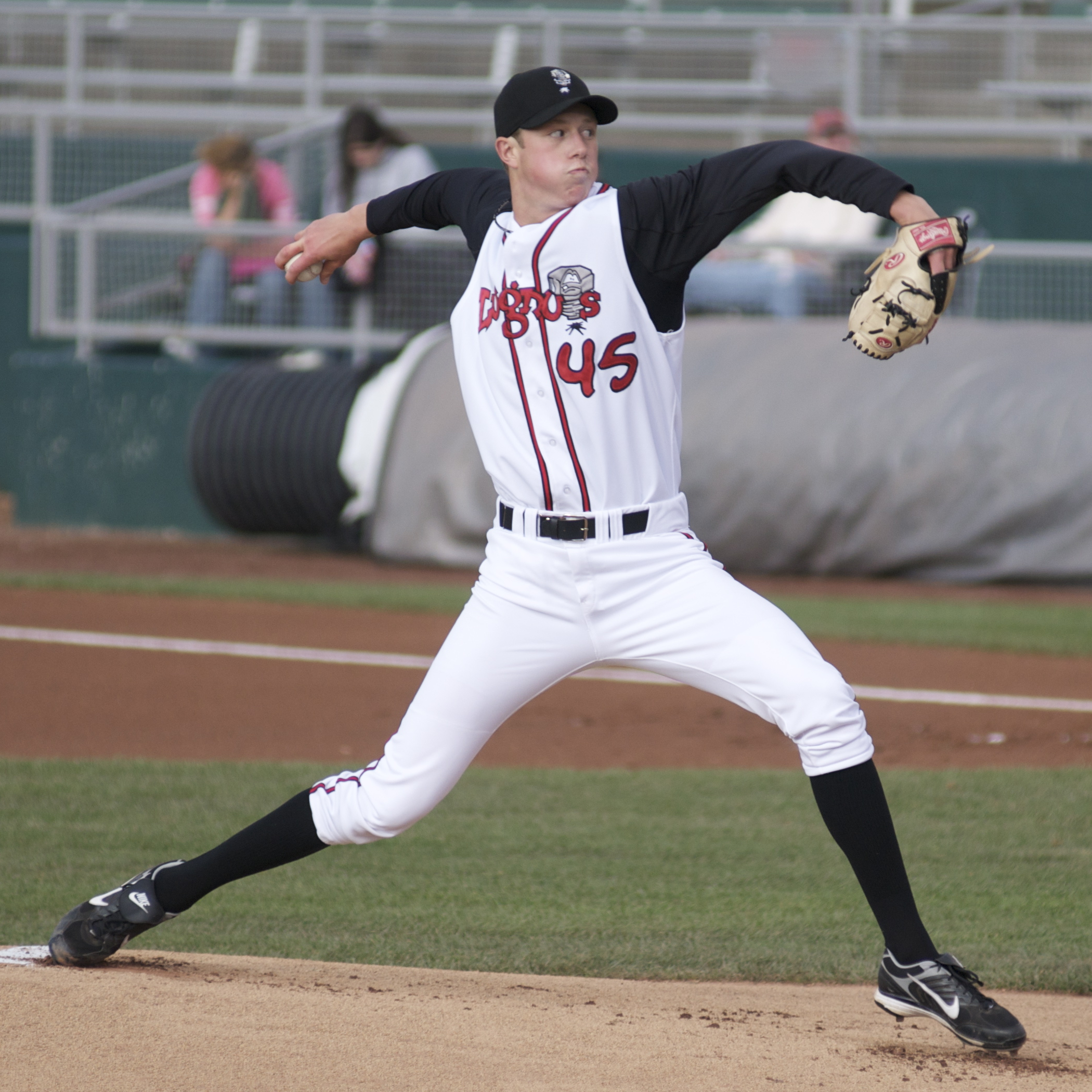 Trystan Magnuson